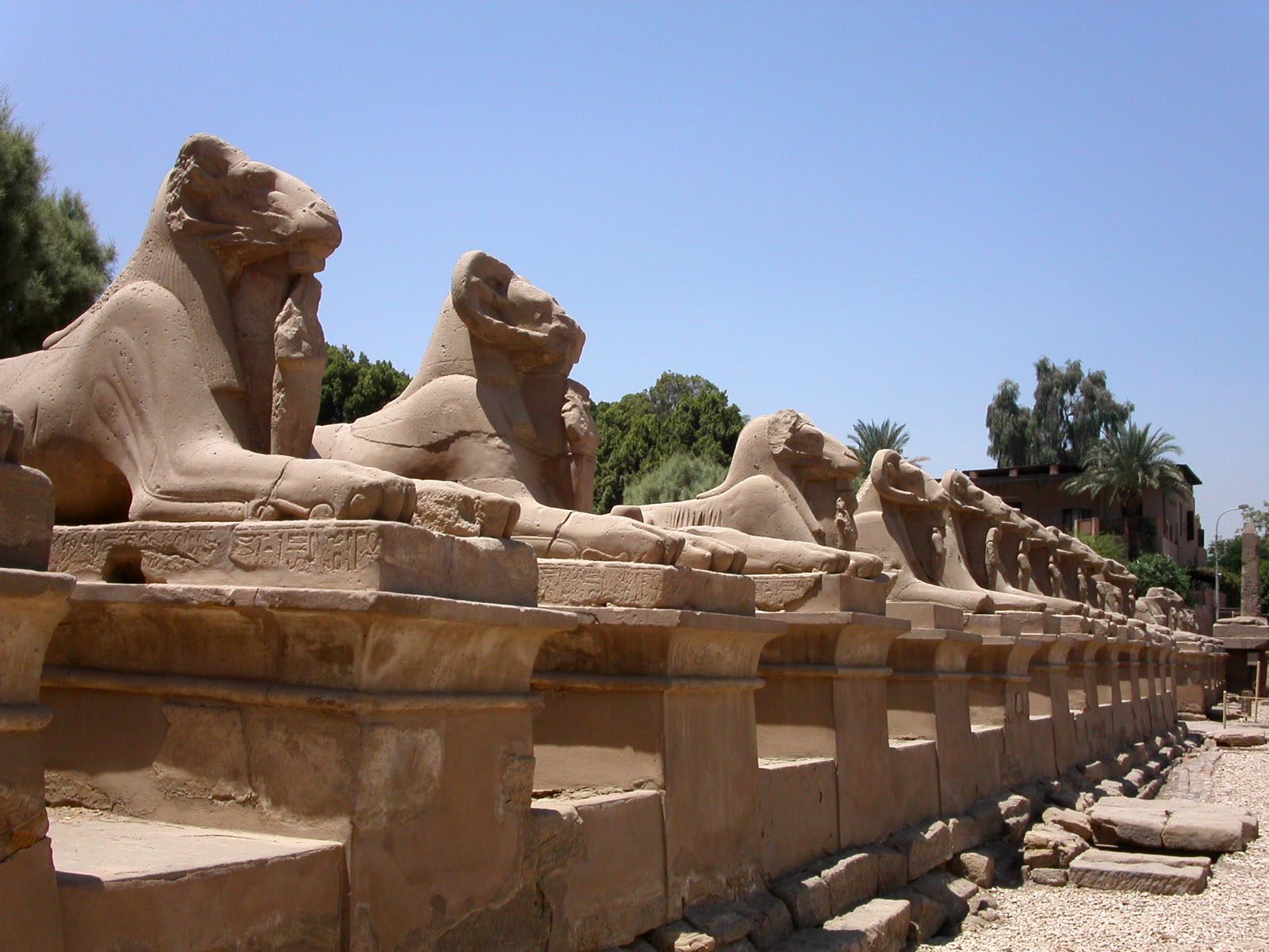 Allée des sphinx, entrée du temple de Louxor, Egypte, Août 2004.